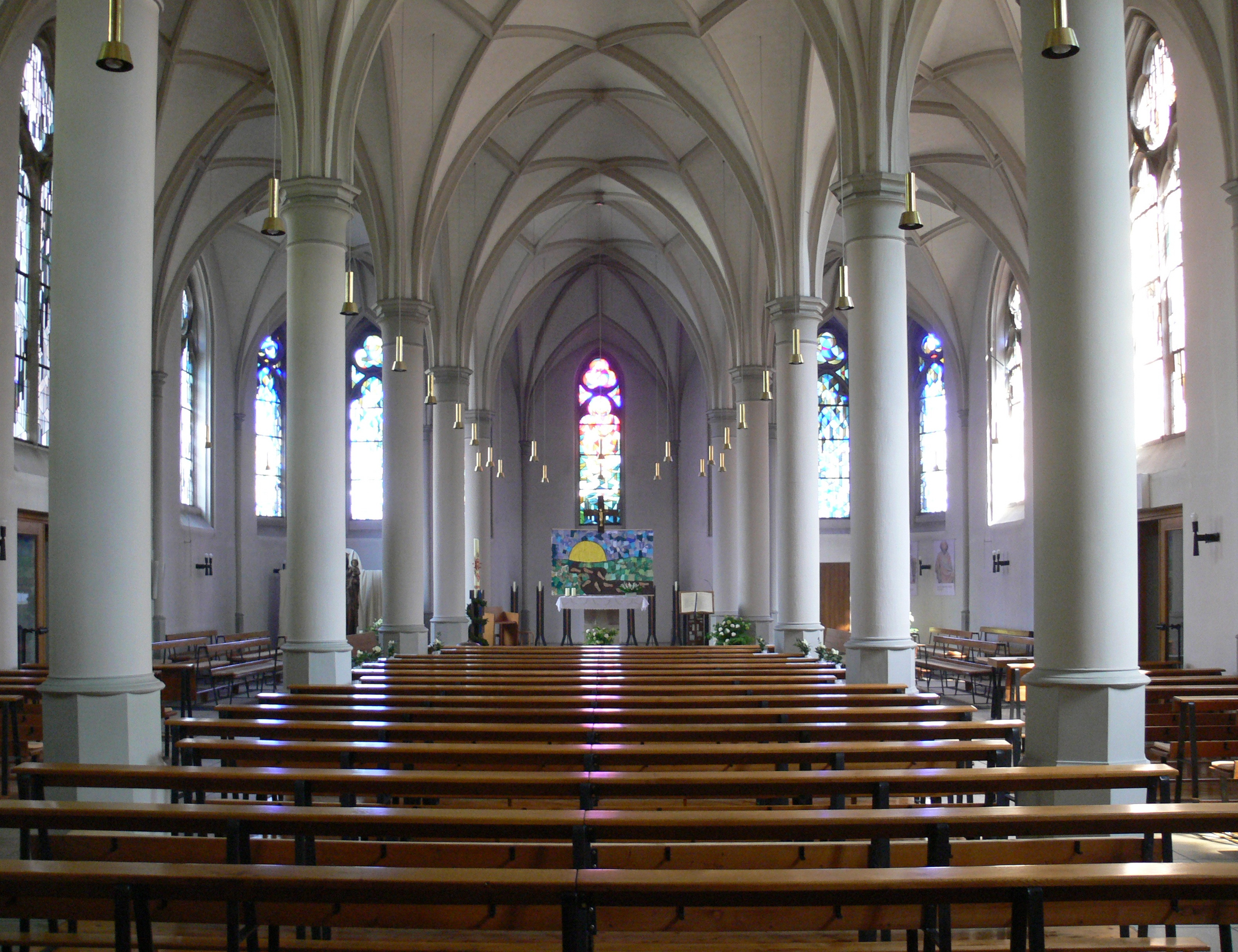 Dessau, Propsteikirche St. Peter und Paul, Blick zum Chor